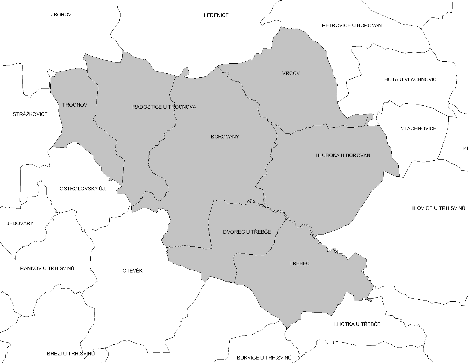 Katastr Borovan